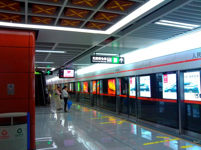 成都地铁2号线人民公园站台